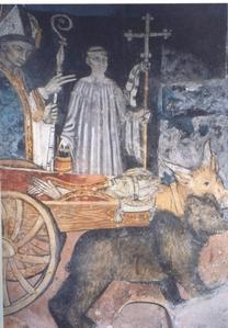 Peinture murale de l’église d’Auron datant de la première moitié du XVe s et montre l’évêque de Gap, Saint Arige, porté en terre sur un char tiré par un bœuf et un ours